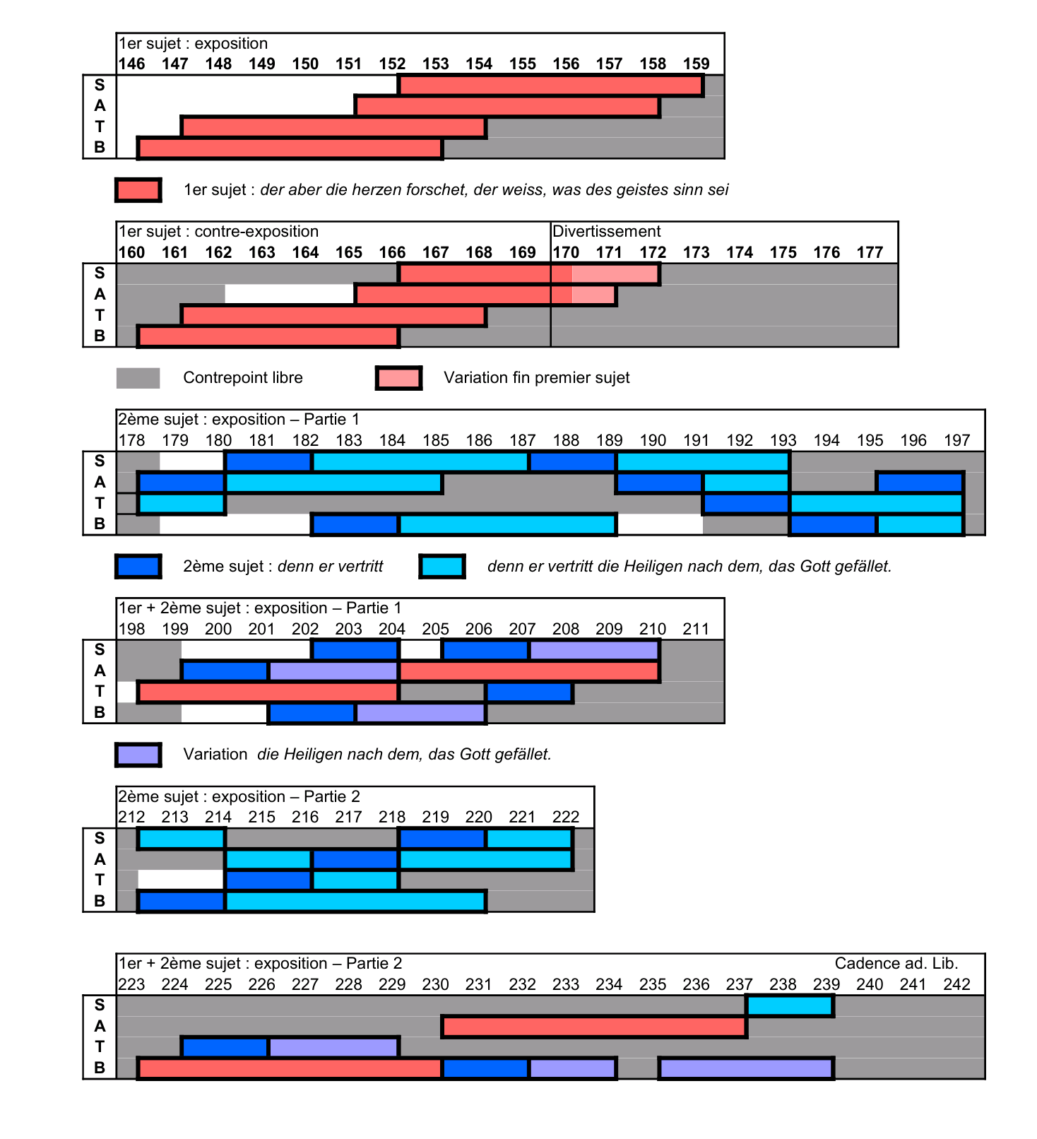 Structure de la fugue du Motet BWV 226 Source : Jennifer Marie Smith, Aspiring Toward Heaven: Tonal, Motivic, And Narrative Structure In Two Of J. S. Bach's Motets